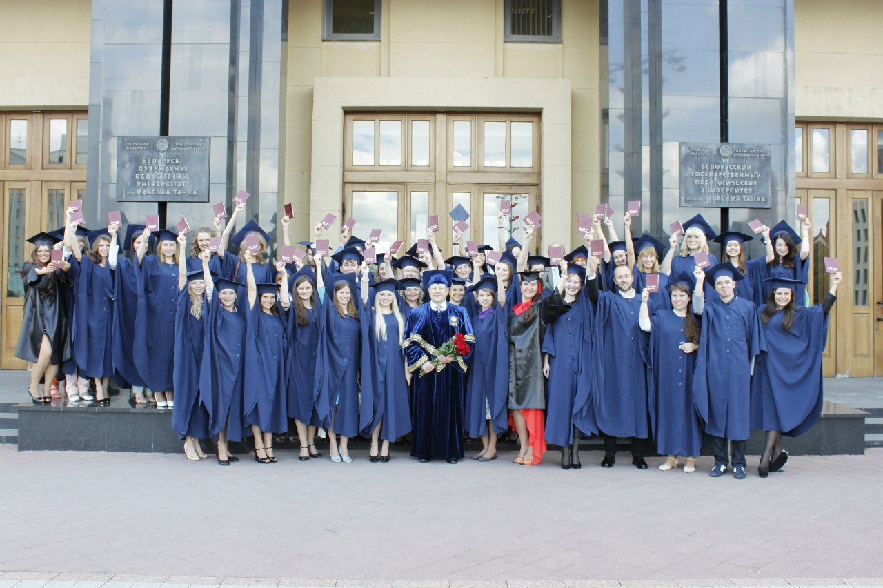 БГПУ сегодня.